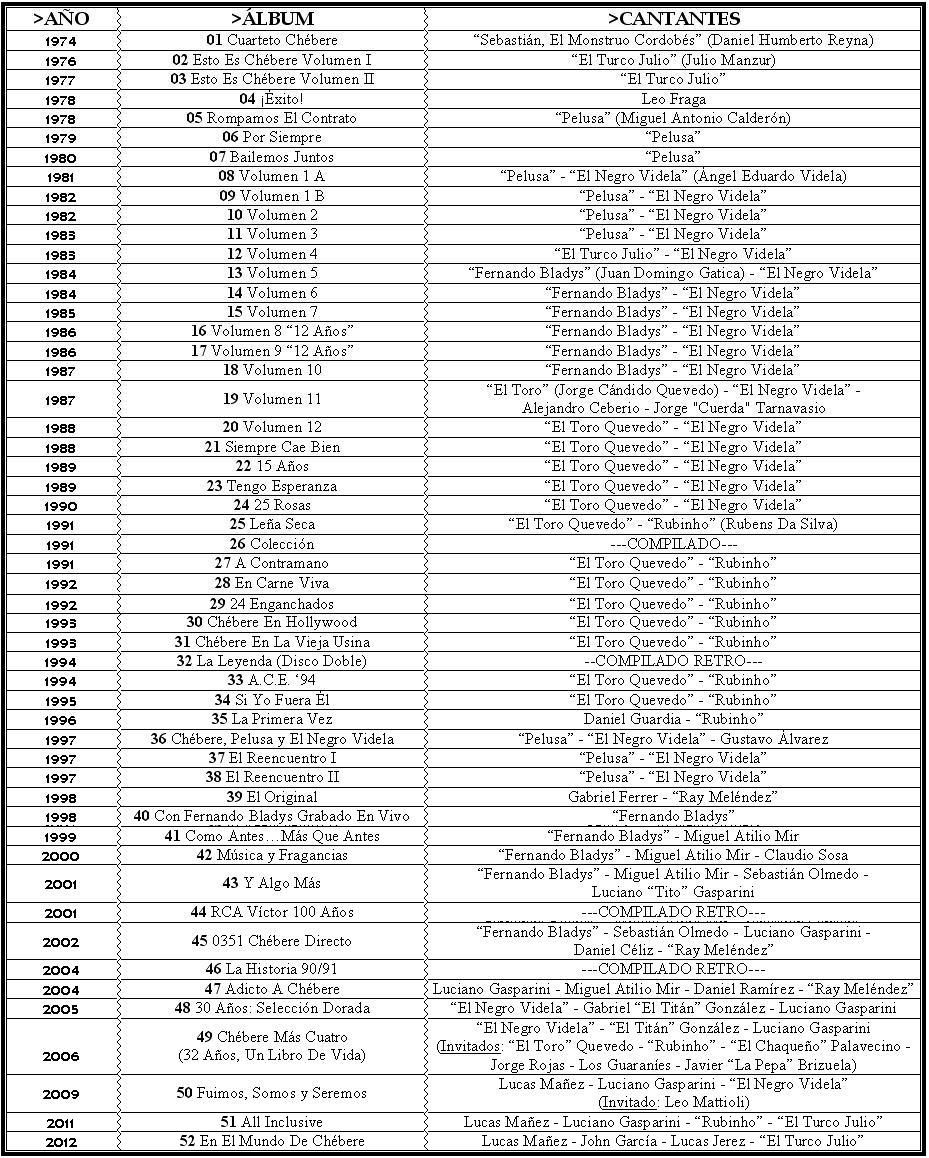 Discografía de Chébere detallada por años y cantantes.